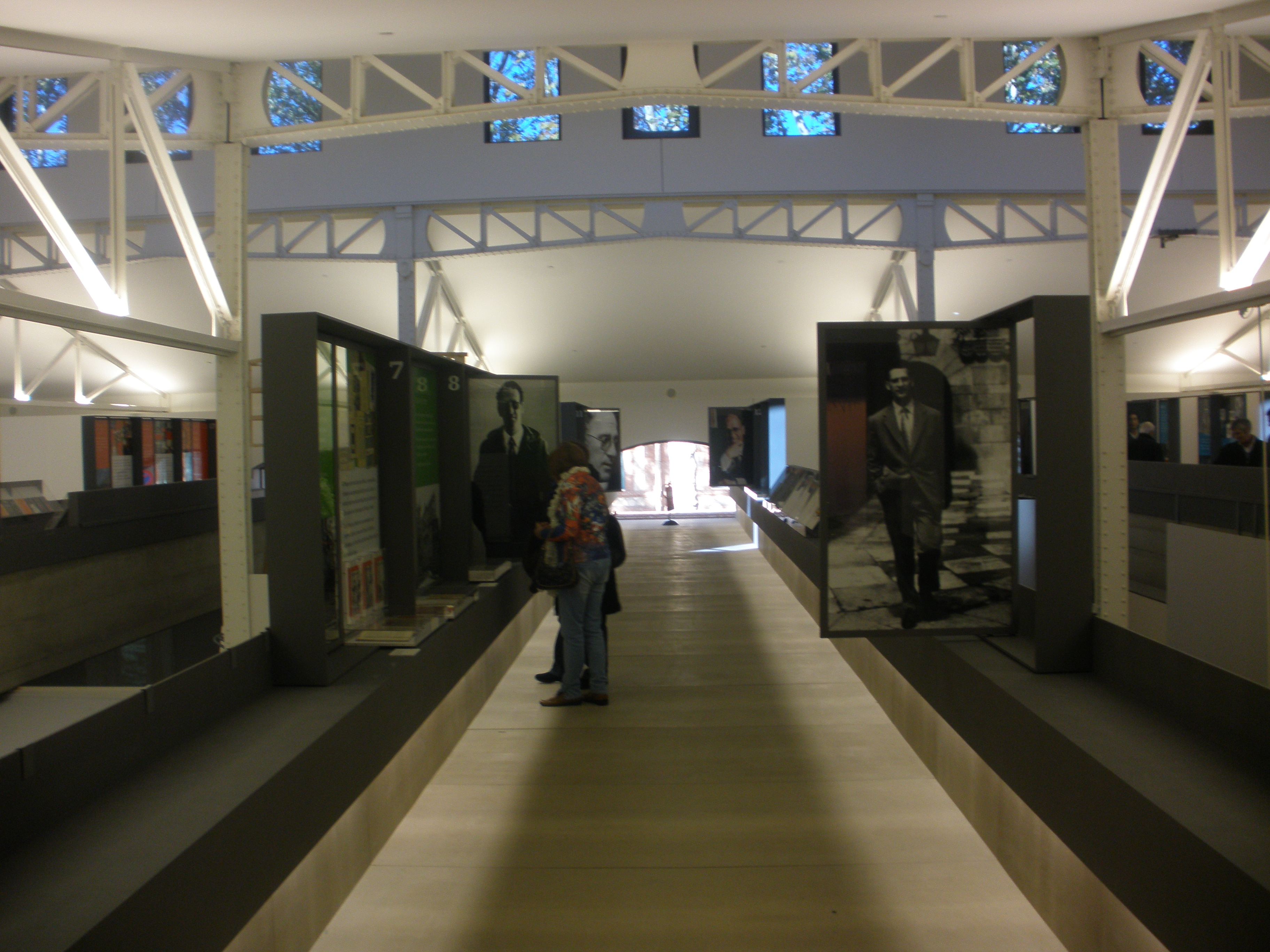 Exposición 'Germán' (sobre Germán Sánchez Ruipérez) en la Casa del Lector (Matadero Madrid) en diciembre de 2012